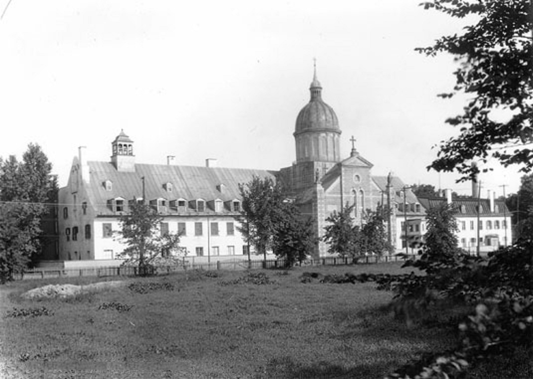 Trois-Rivières : Monastère des Ursulines / Edgar Gariépy. août 1928. 1 photographie : négatif sur pellicule de nitrate de cellulose ; 17,5 x 12,5 cm. Photographie de la façade du monastère des Ursulines à Trois-Rivières. On y voit le terrain à l'avant du monastère.